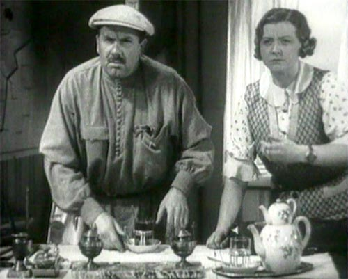 Кадр из фильма «Волга-Волга» (1938)Кадр из фильма «Волга-Волга». Игорь Ильинский и Мария Миронова.